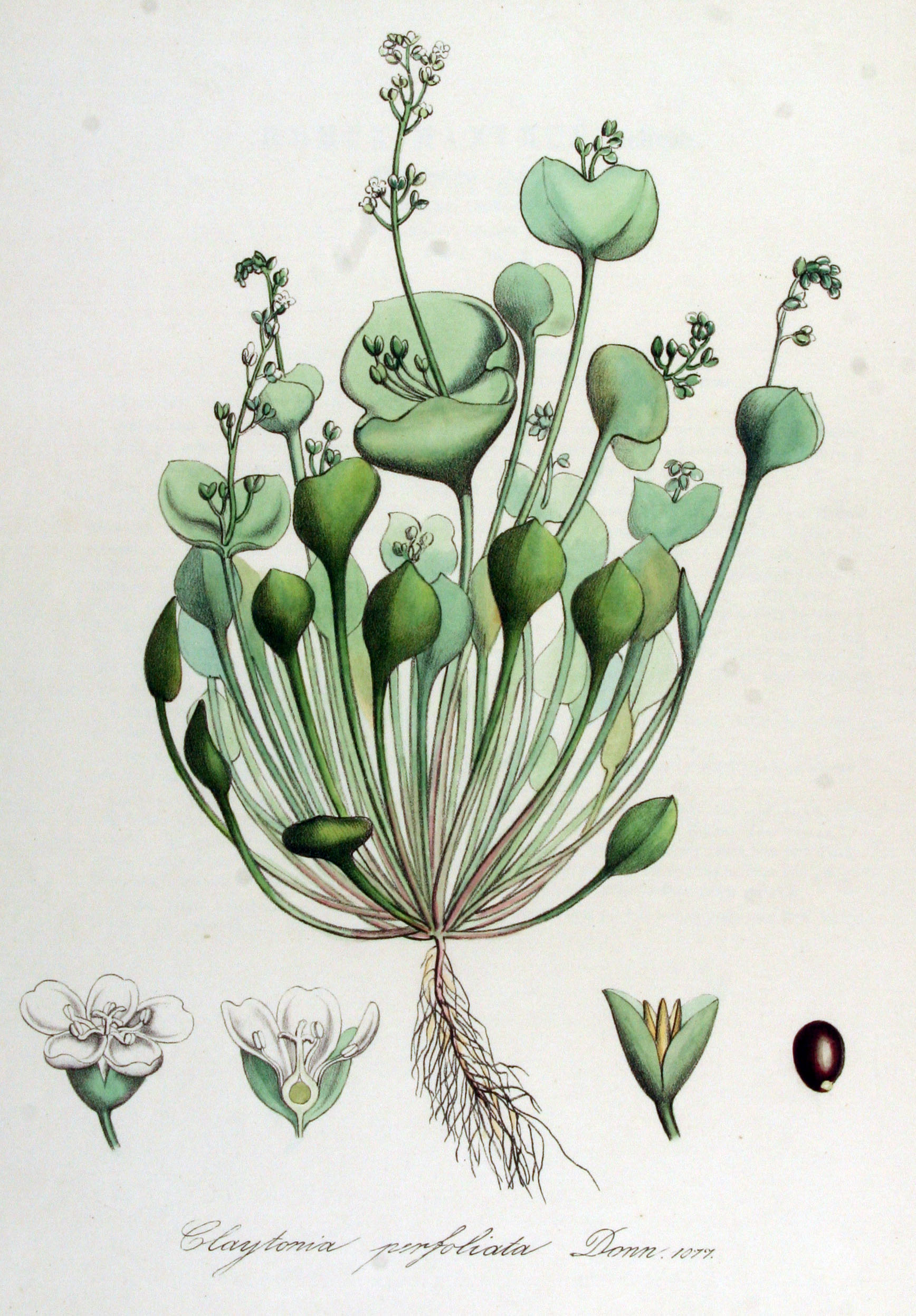 Claytonia perfoliata Donn ex Willd.